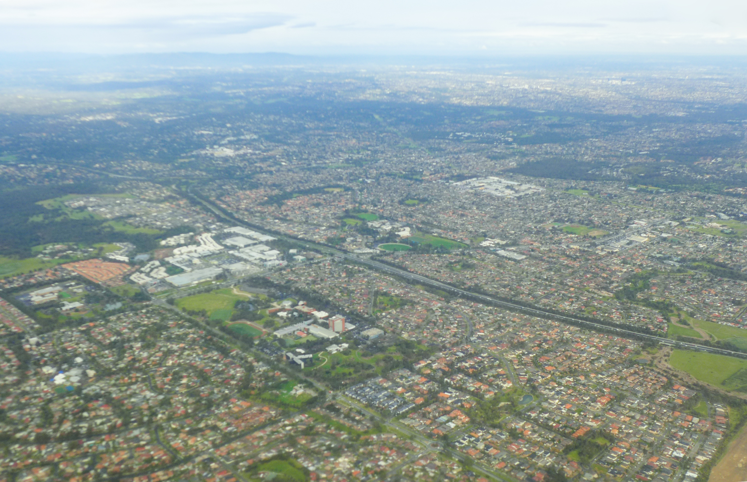 Bundoora, Victoria